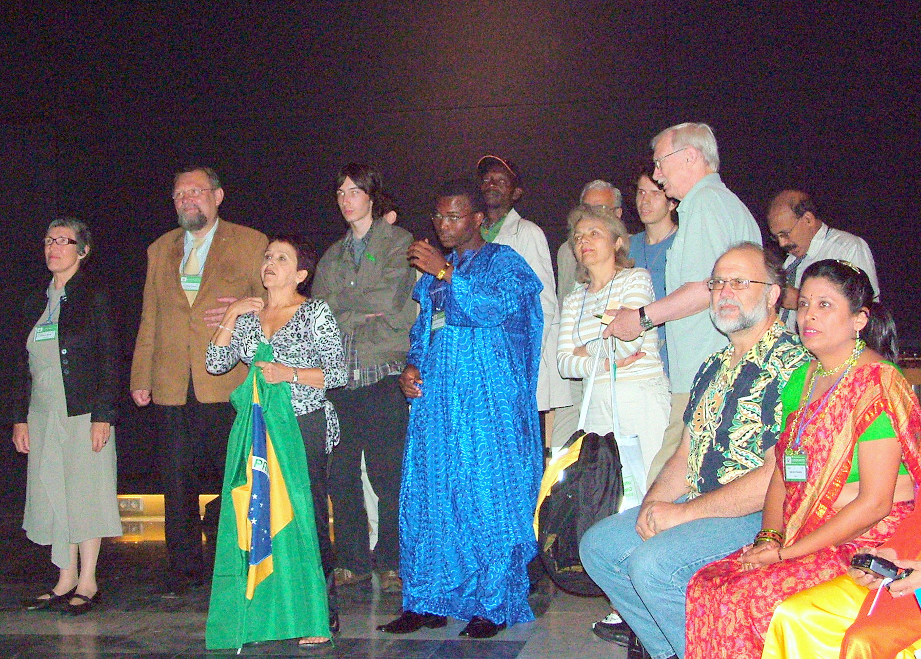 Universala Kongreso de Esperanto, Roterdamo 2008. Landaj salutontoj.